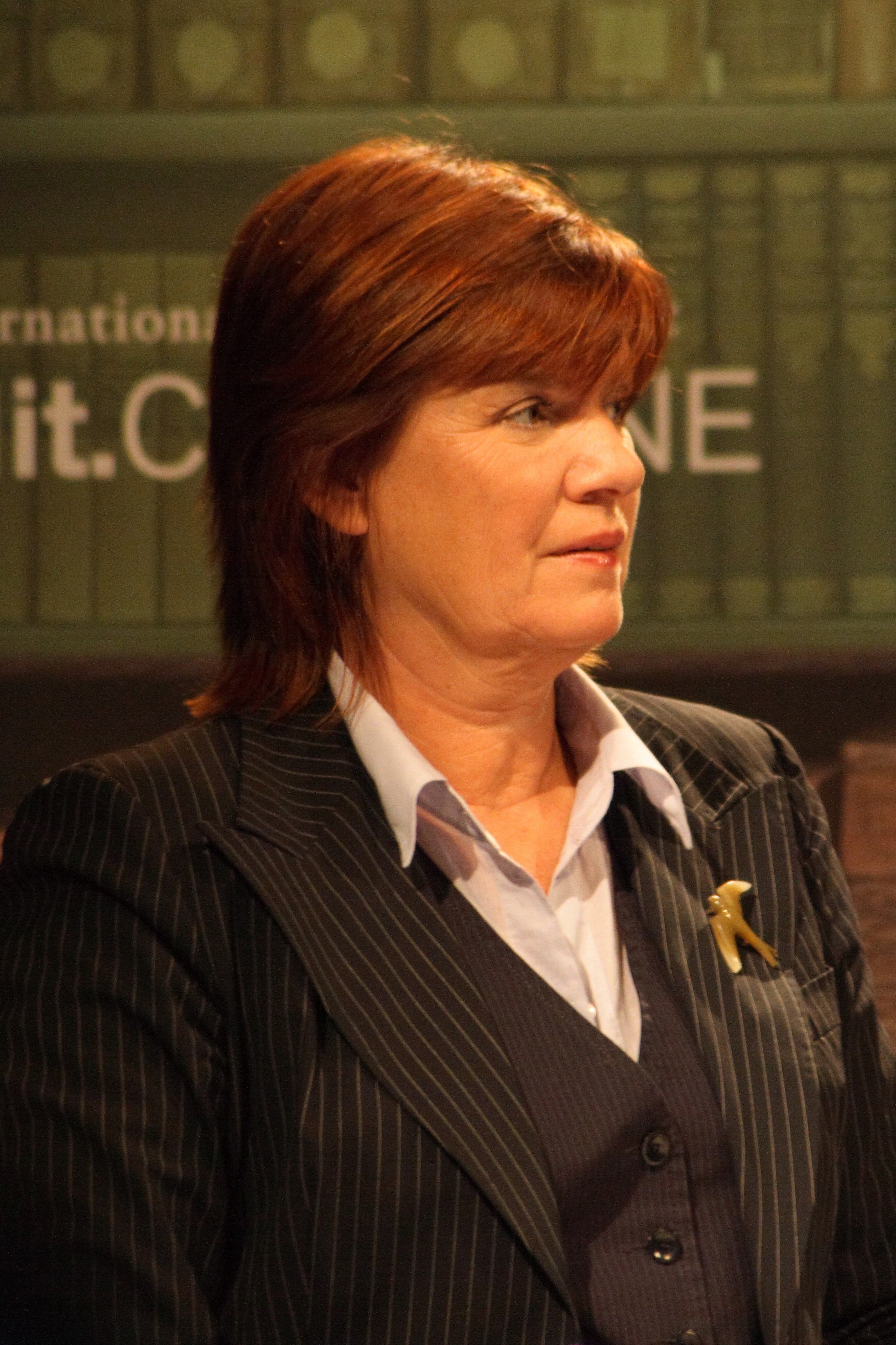 Christine Westermann auf dem WDR5-Literaturmarathon während der lit.Cologne 2008